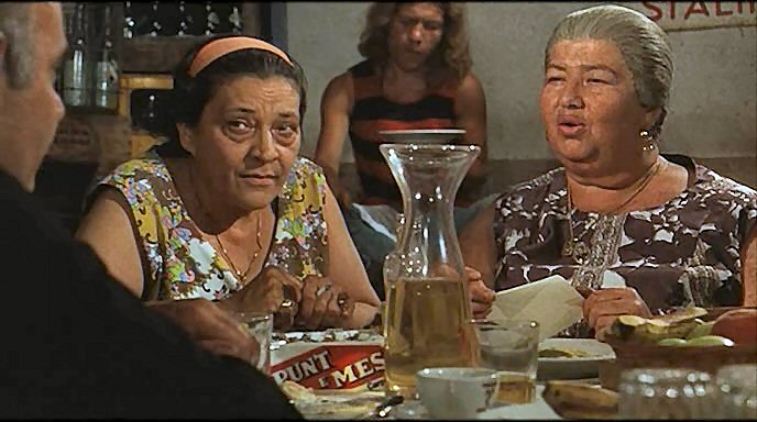 Screenshot del film Trastevere (1971) di Fausto Tozzi